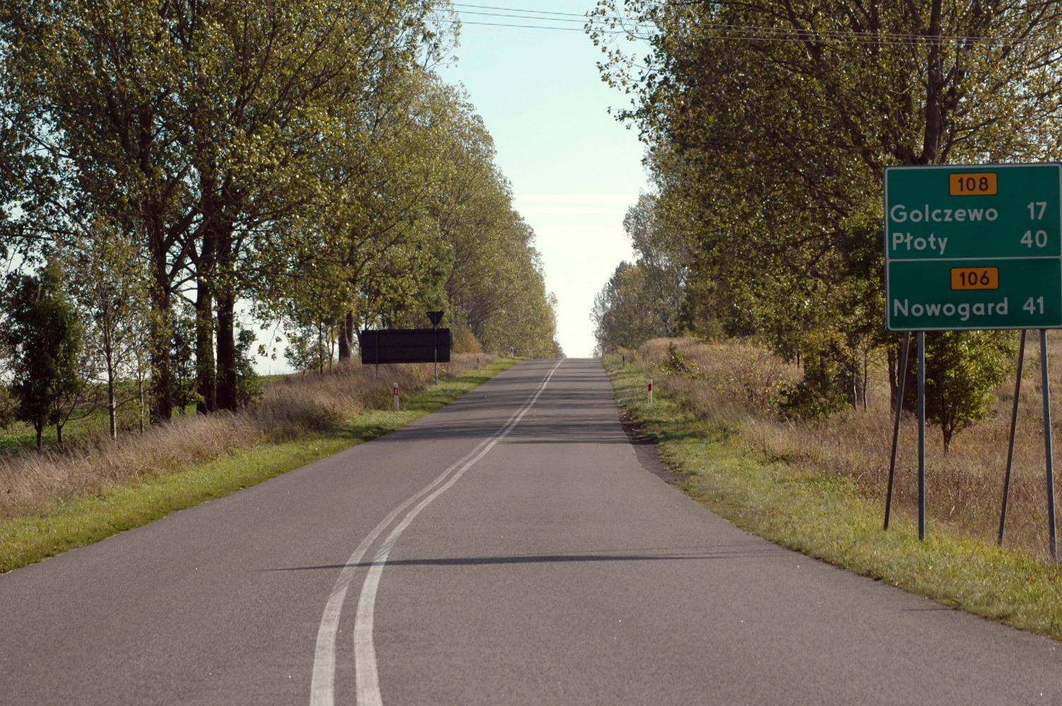 Początek drogi wojewódzkiej nr 108 w Parłówku.